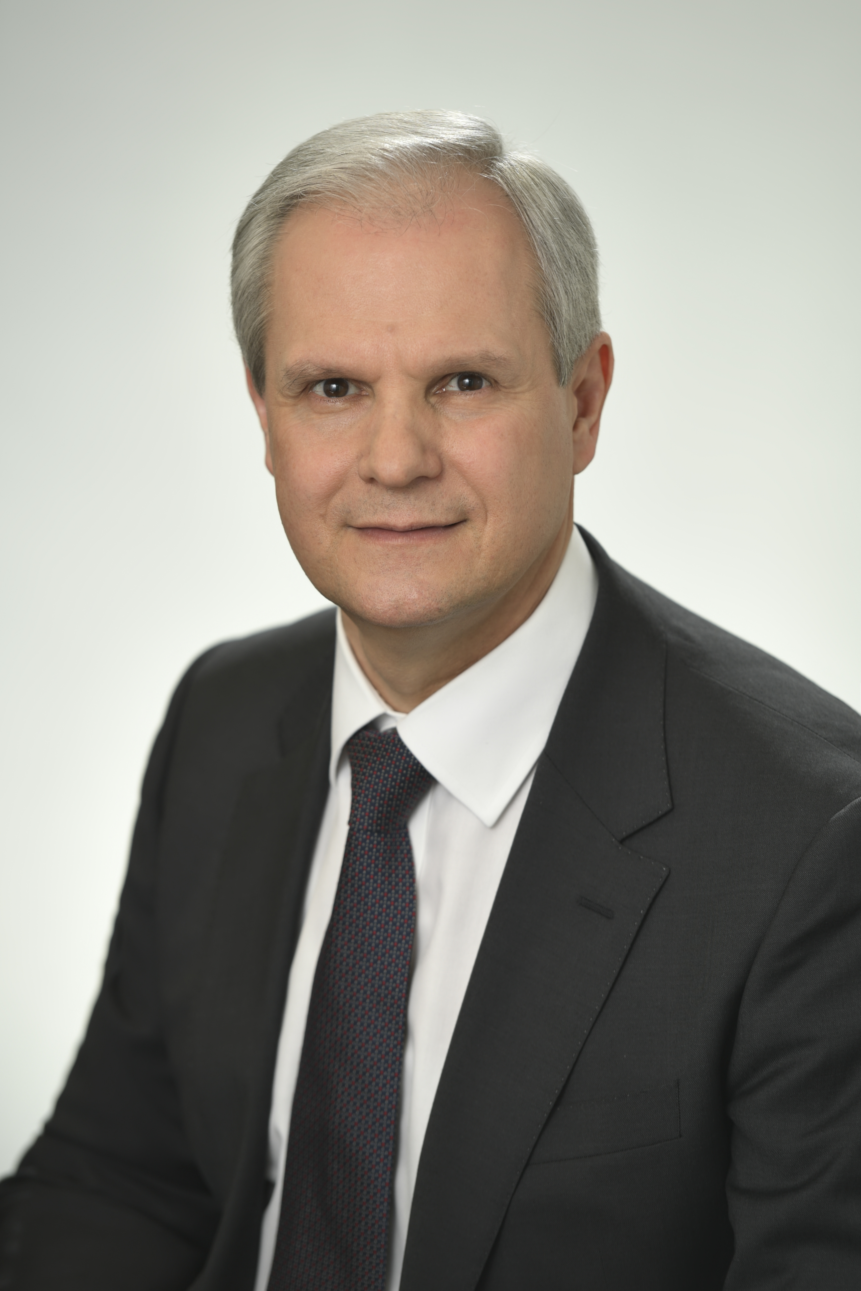 Председатель Правления АТБ - Аврамов С.В.